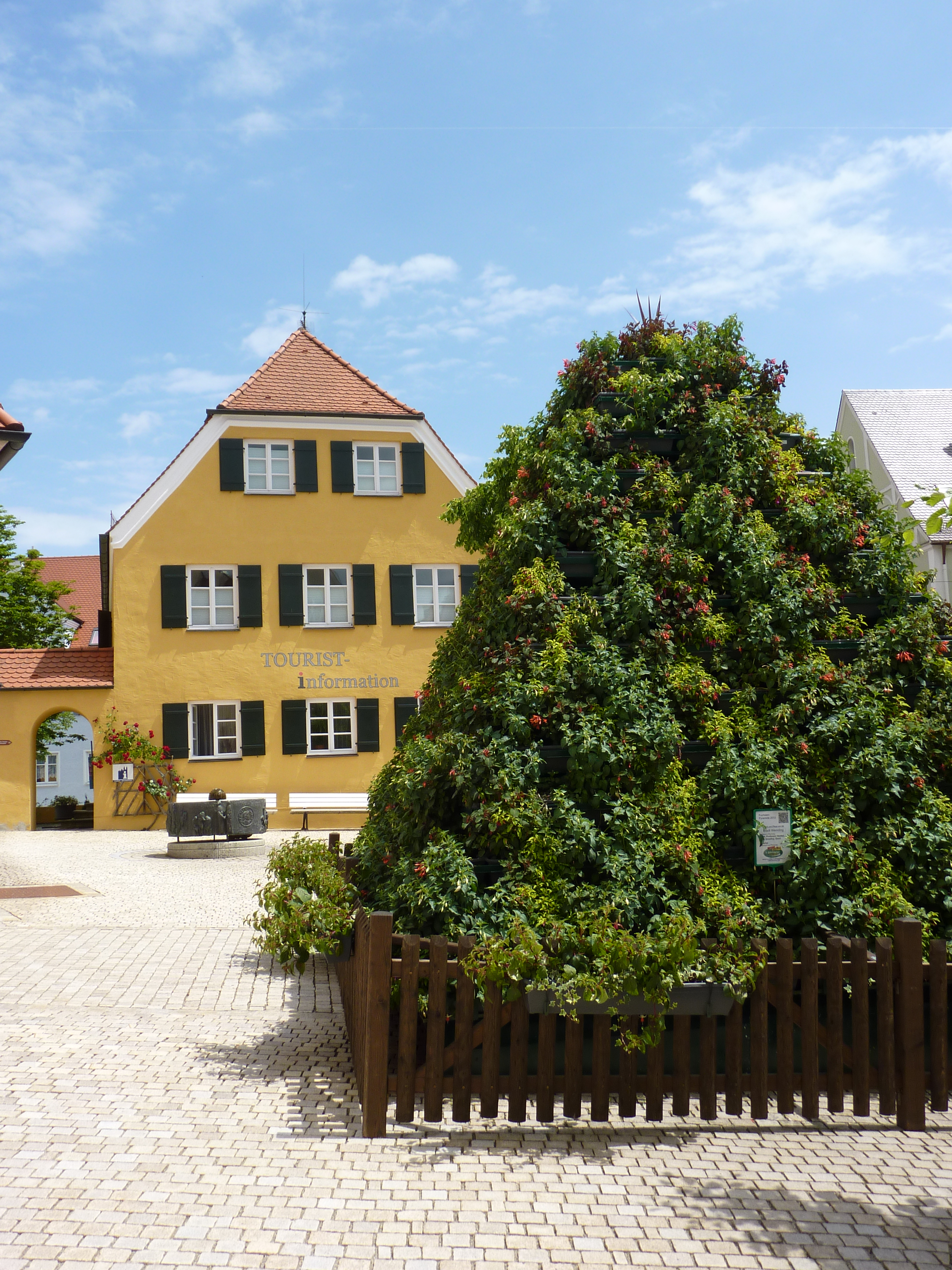 Tourist-Information unweit des Marktplatzes